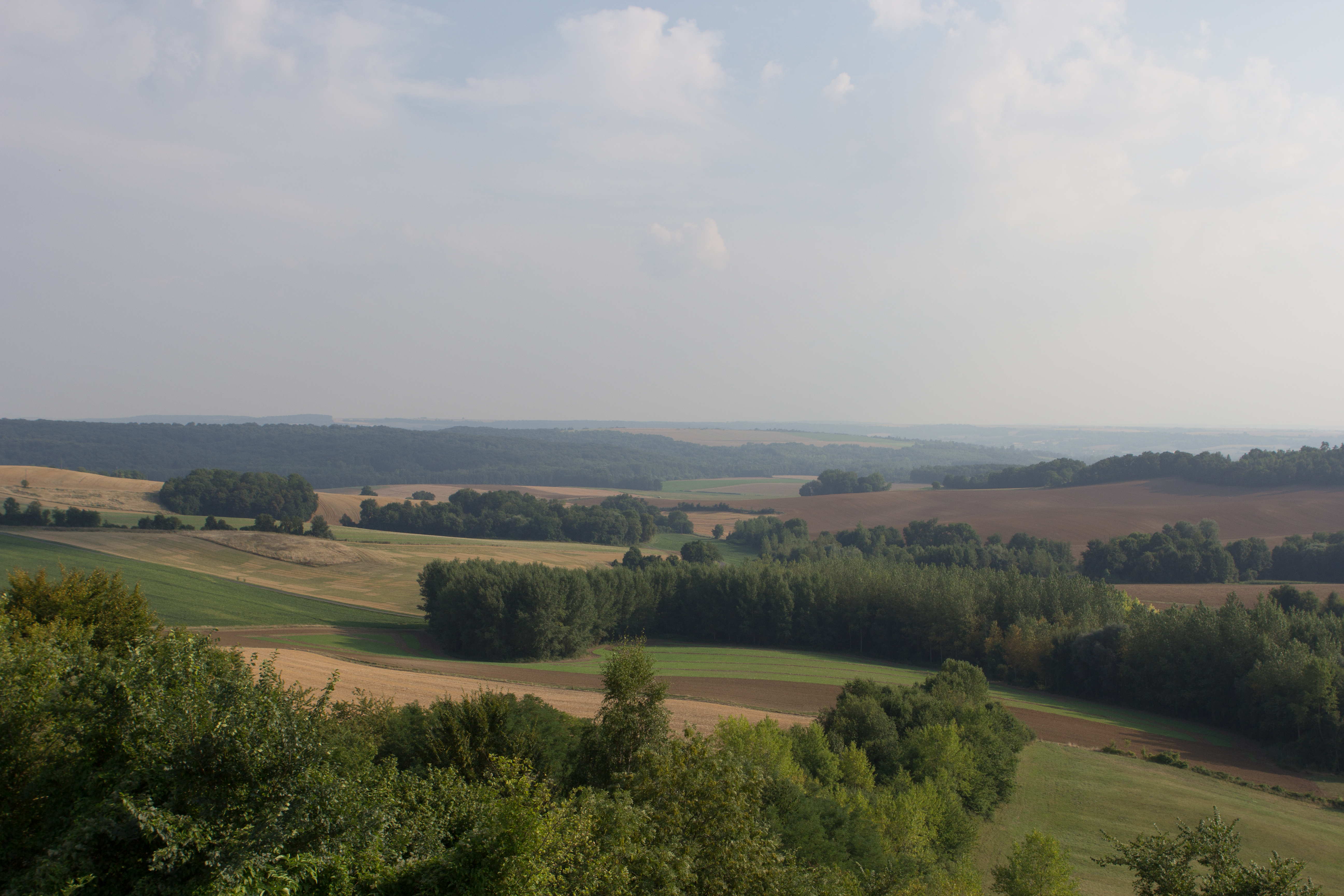 Le Chemin des Dames au bord du versant nord de la vallée de l'Aisne, au niveau de la caverne du Dragon, département de l'Aisnes, France